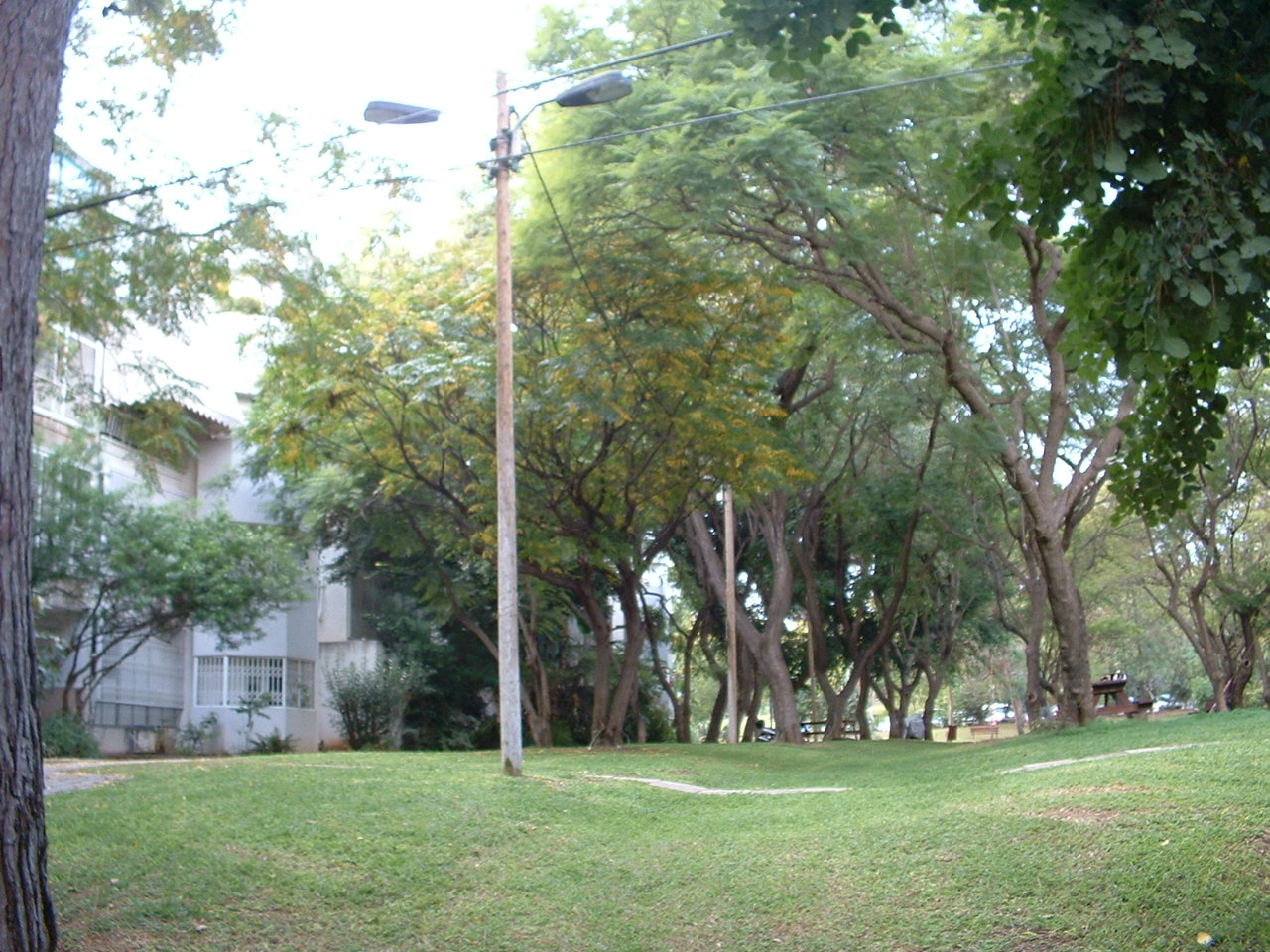 מראה אופיני במעוז אביב